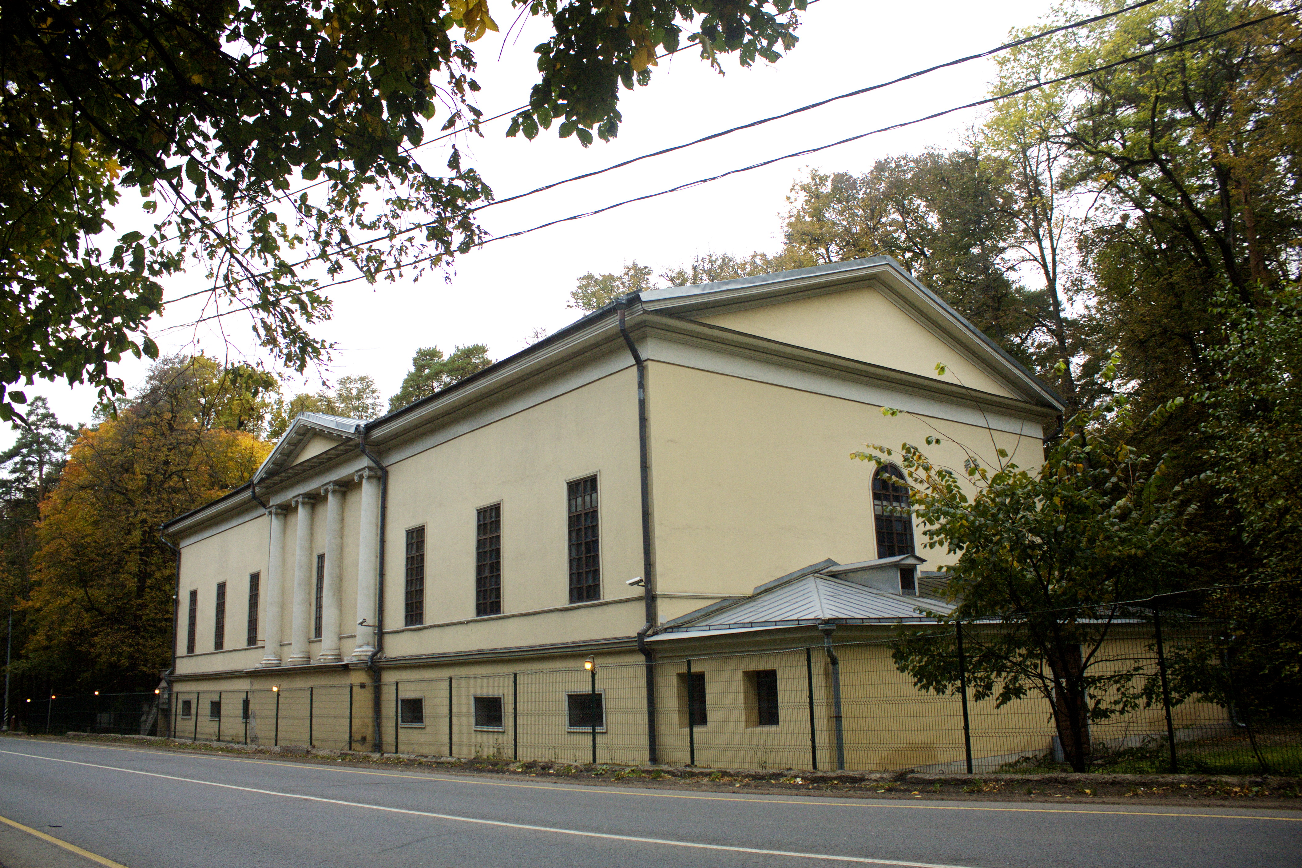 Театр Гонзаго: Архангельское, Красногорский район, Московская область